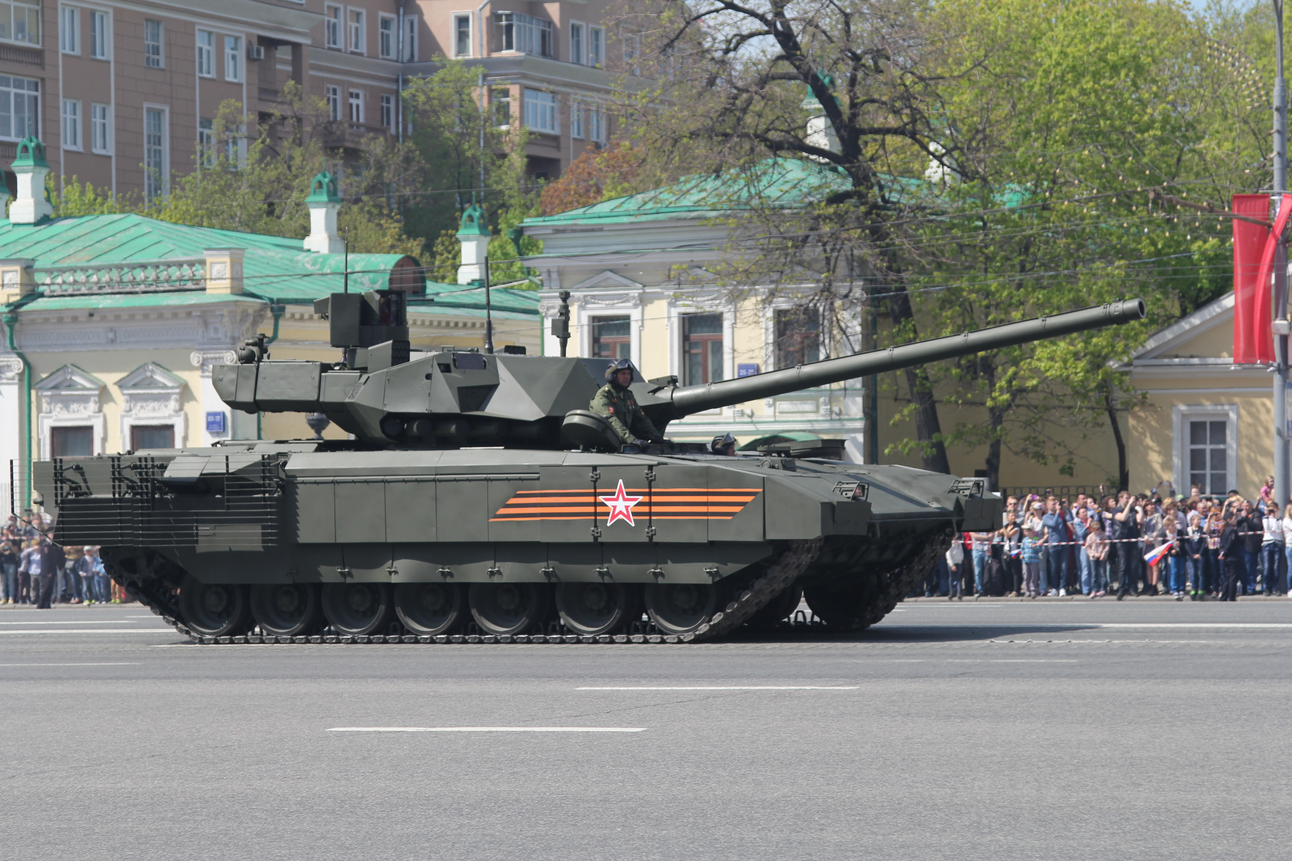 Танк «Армата» Т-14